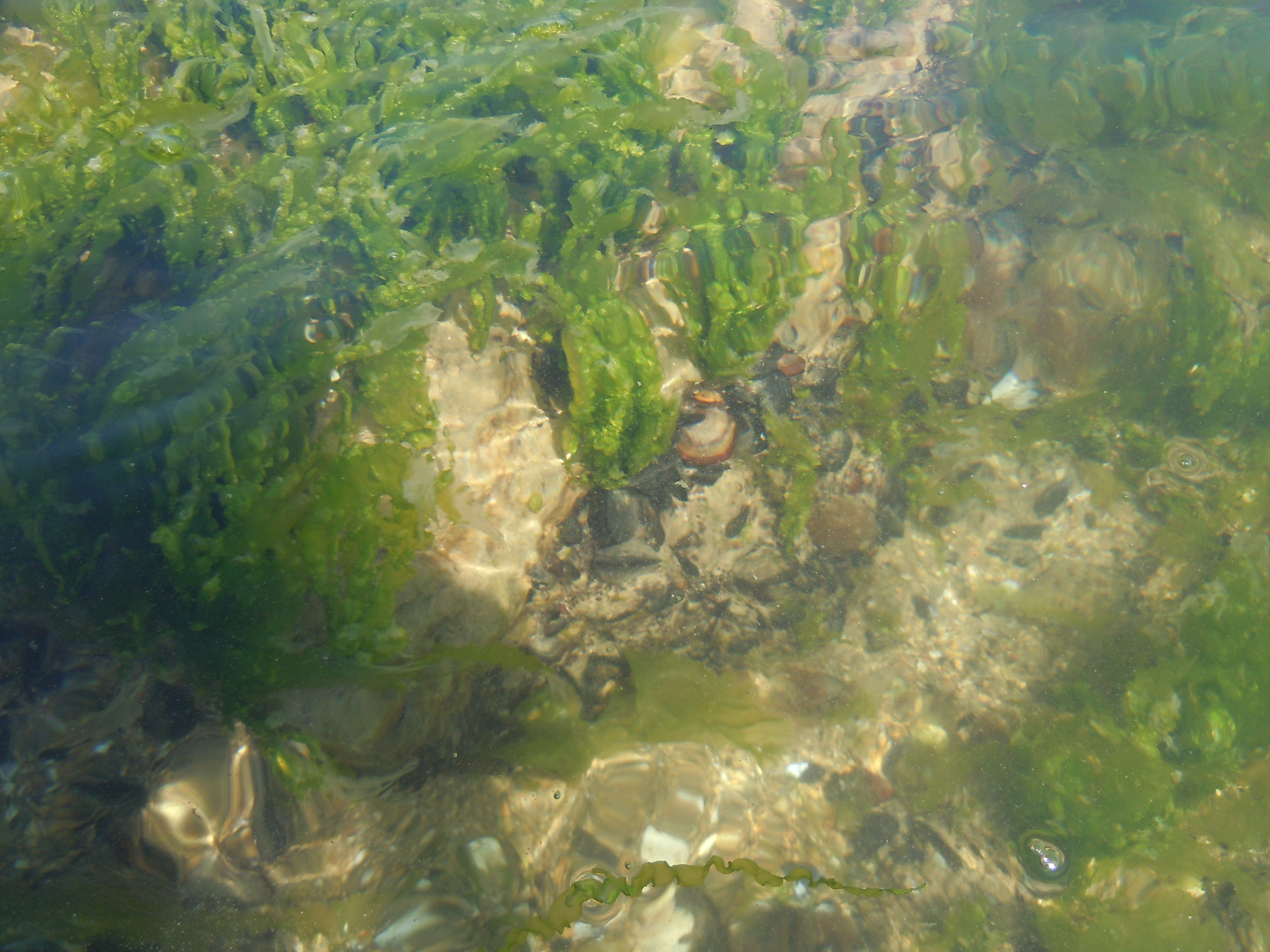 Обростання ентероморфа (Ulva intestinalis) і мідії (Mytilus galloprovincialis) на каміннях у Григорівському лимані